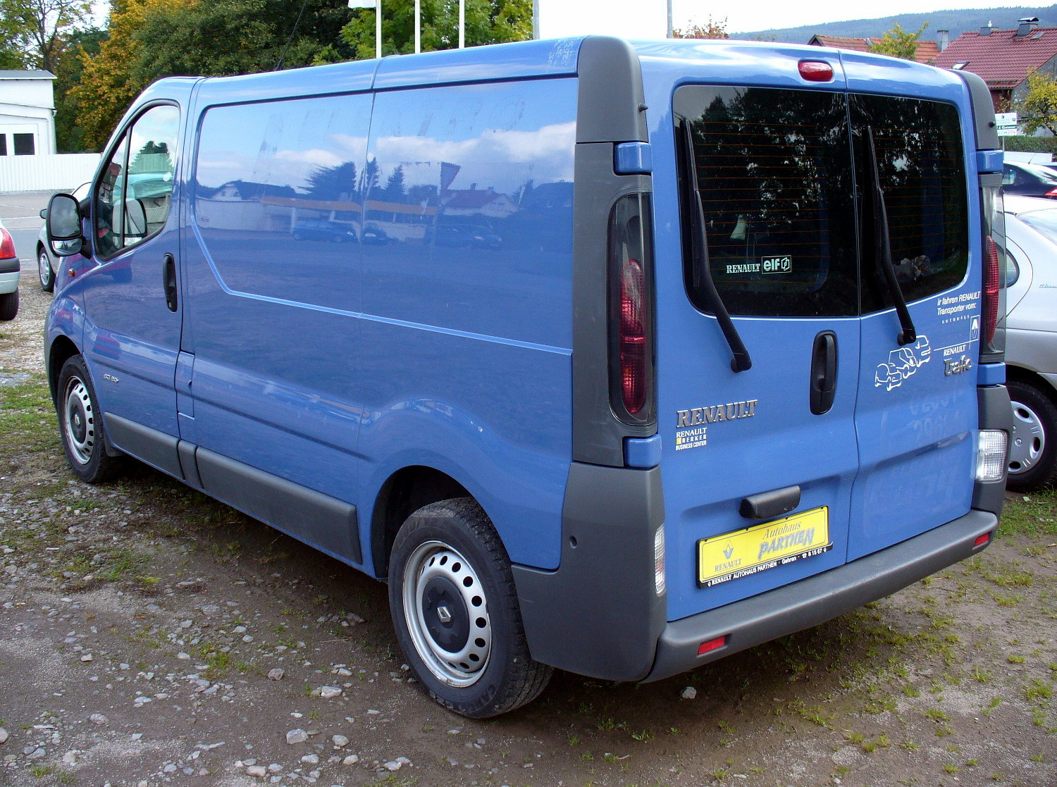 Renault Trafic